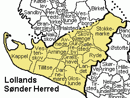 Lollands Sønder Herred Maribo Amt , Denmark. Map by Svend-Erik Christiansen, edited by user:Nico-dk .